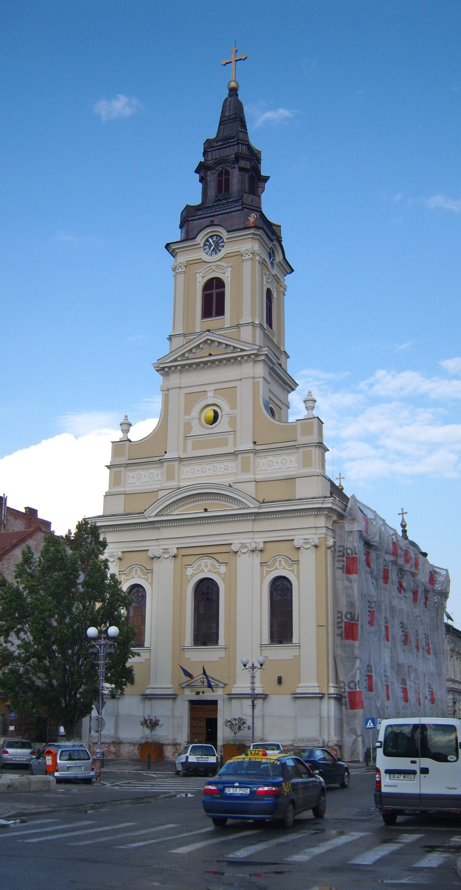 Biserica cu Luna